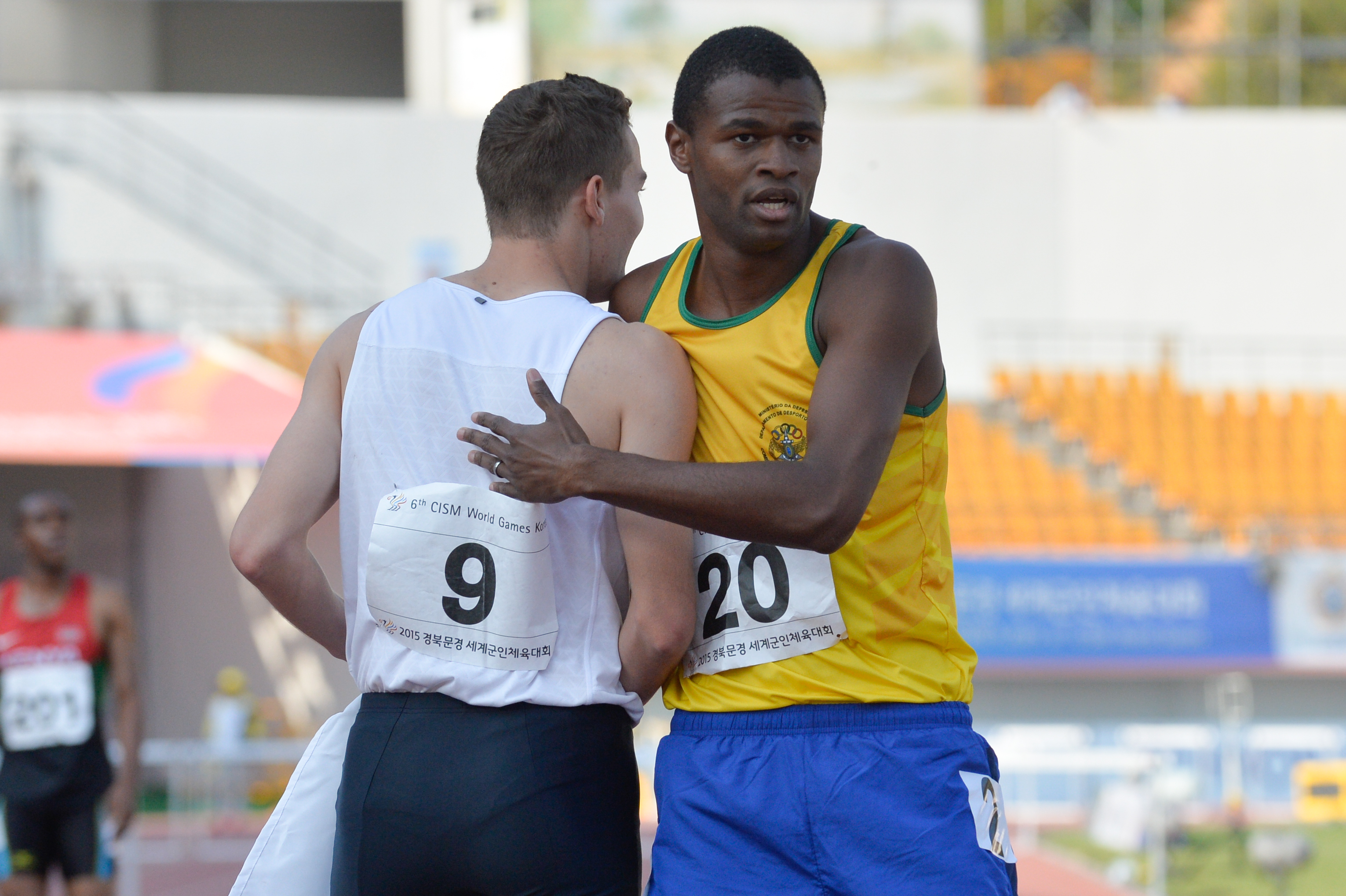 Hederson Estefani nos 400 metros com barreiras